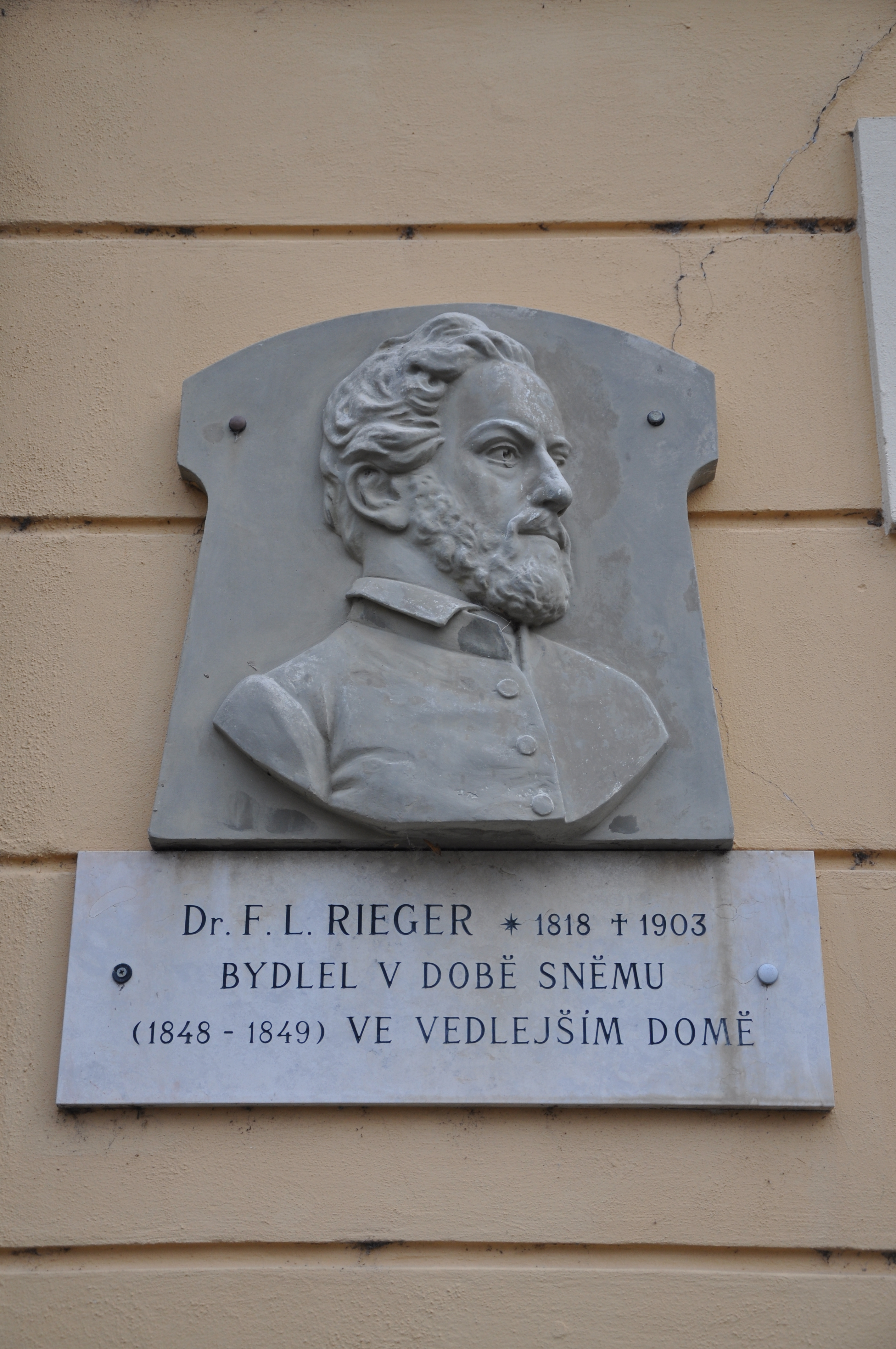 pamětní deska Františka Ladislava Riegera na domě č.p. 160/13 na Riegerově náměstí v Kroměříži z roku 1911 od Jana Antonína Becka (1864-1937)